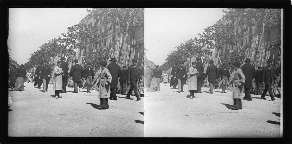 Venda de palmes i palmons a la Fira de rams de rambla Catalunya. Frederic Bordas i Altarriba (ca. 1890)